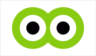 Kizoo